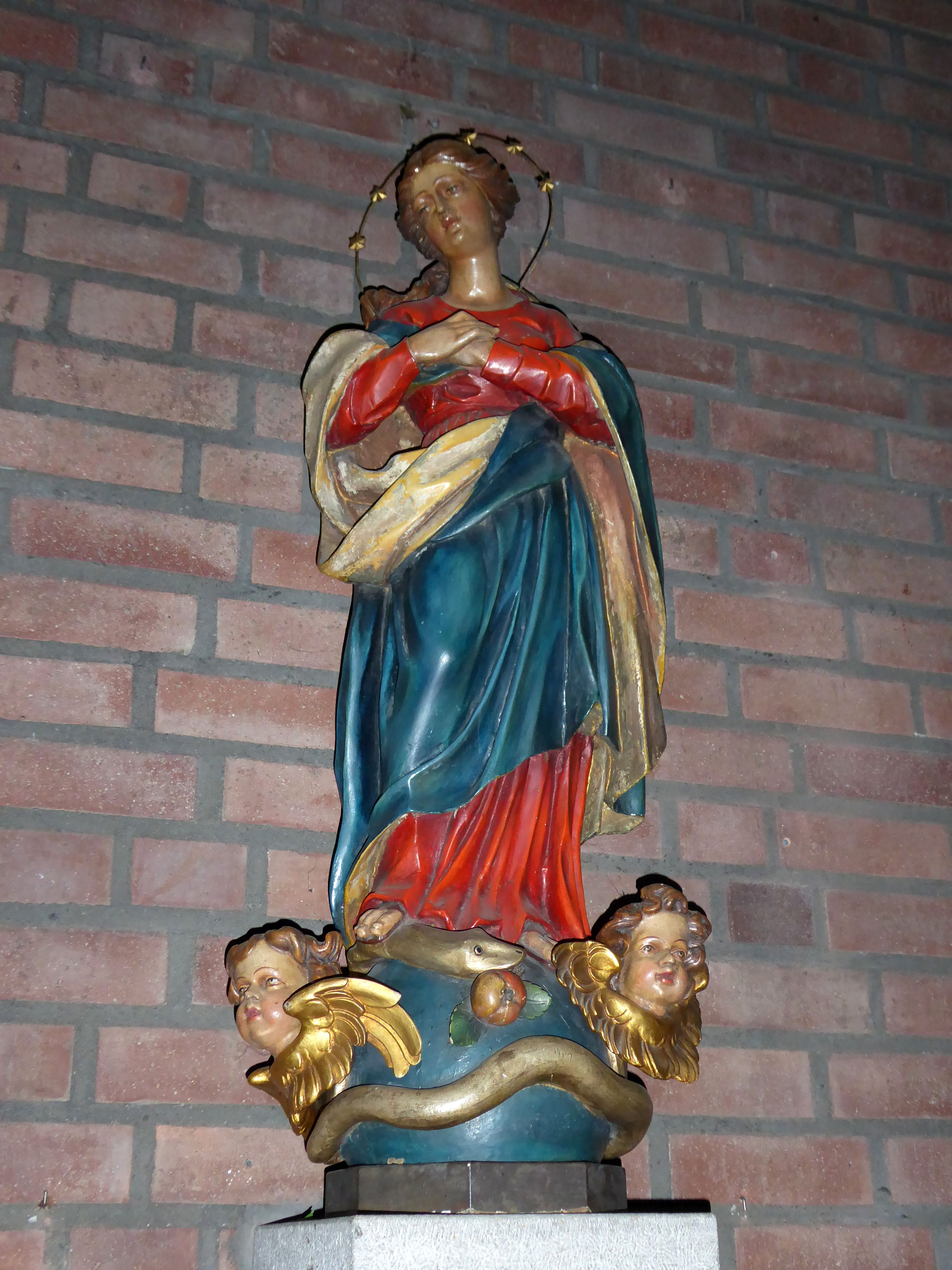 St. Mariä Namen (Köln-Esch)